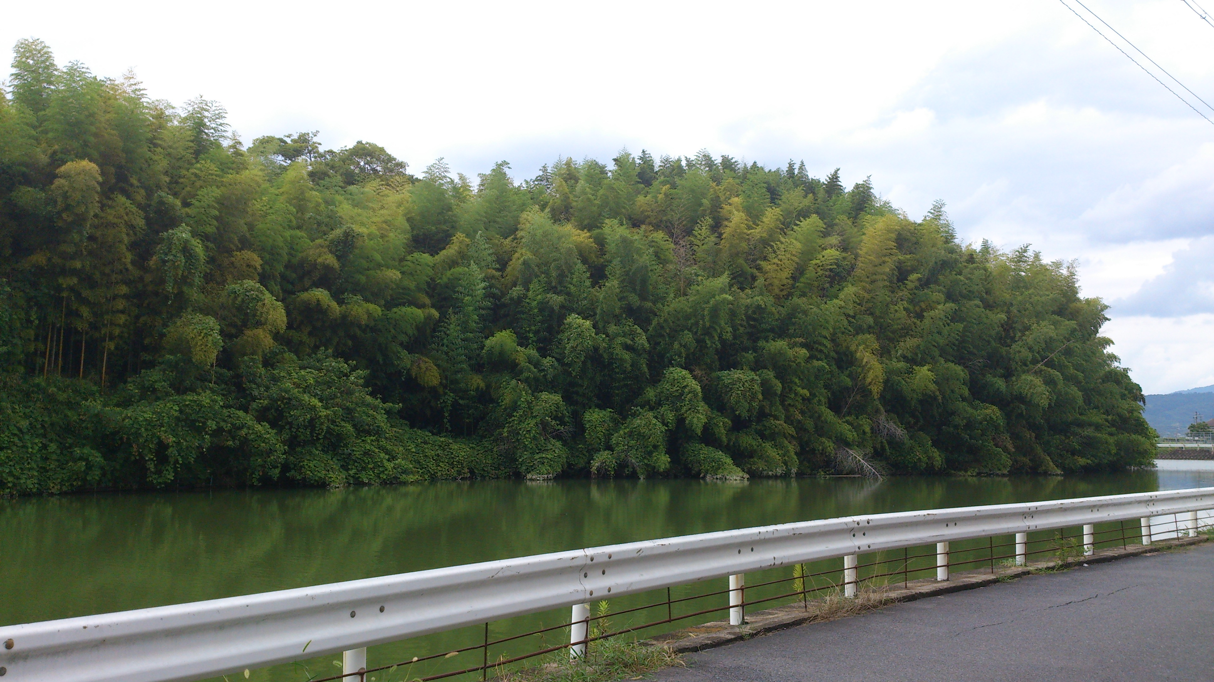 島の山古墳